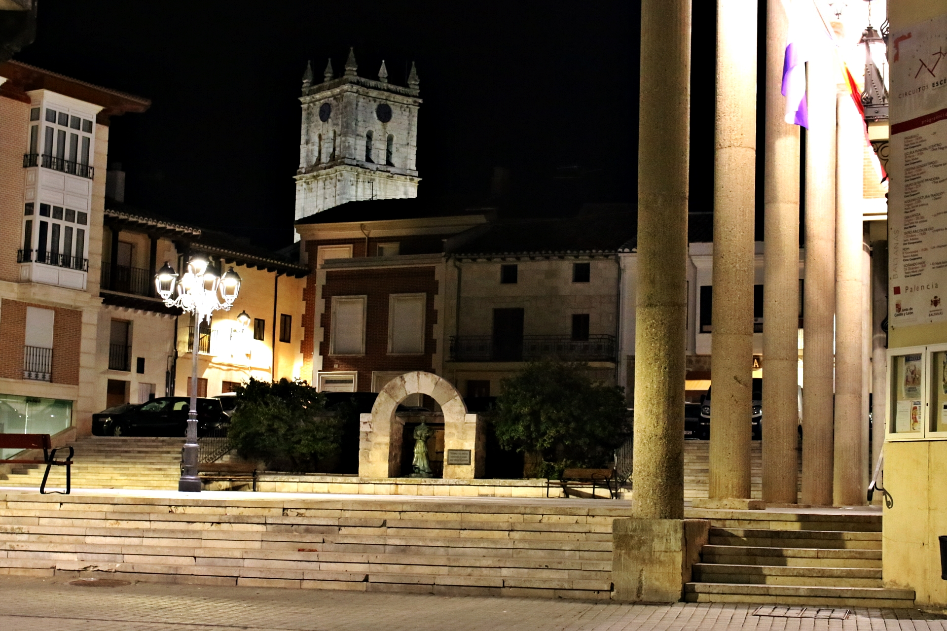 Baltanás nocturno